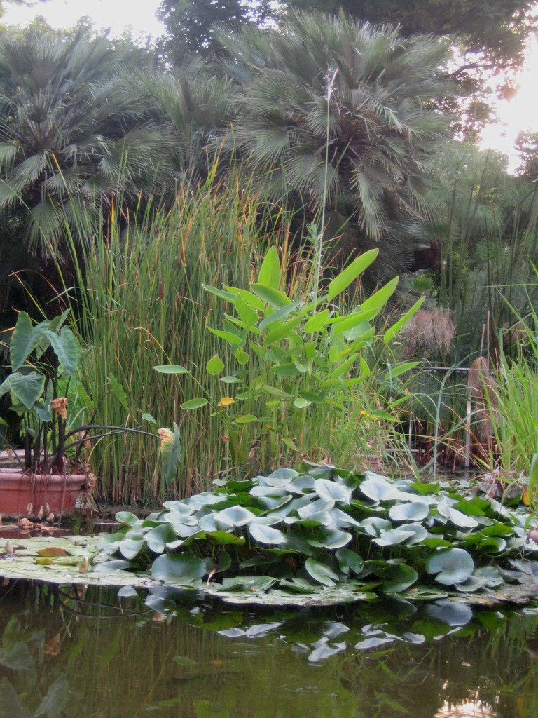 Estanque en Jardín botánico de Valencia. España